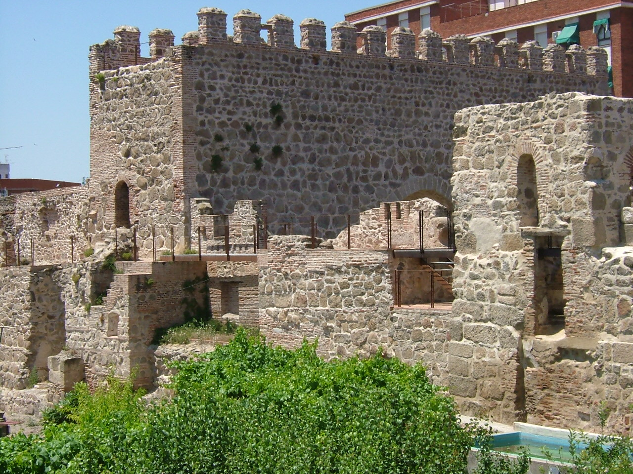 Muralla del monasterio de San Benito en Talavera de la Reina, España